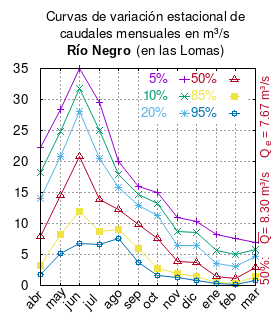 Curvas de variación estacional del río Negro (del Maullín) en Las Lomas. # Dirección General de Aguas # Diagnóstico y clasificación de los cursos y cuerpos de agua según objetivos de calidad. Cuenca del río Maullín. # Santiago de Chile # Ministerio de Obras Públicas (Chile) # 2004 # url: # urlarchivo: # Tabla 4.2: Río Negro en Las Lomas (m3/s), pág. 38 mes 5% 10% 20% 50% 85% 95% abr 22.29 18.23 13.99 7.83 3.26 1.81 may 28.35 24.77 20.85 14.46 8.20 5.21 jun 34.97 31.85 28.08 20.86 11.96 6.74 jul 29.57 25.03 20.46 13.91 8.65 6.54 ago 20.00 17.95 15.75 12.26 9.00 7.51 sep 16.00 14.63 12.98 9.83 5.94 3.66 oct 14.93 13.29 11.30 7.50 2.81 1.58 nov 10.90 8.65 6.53 3.81 1.97 1.33 dic 10.33 8.47 6.53 3.66 1.49 0.78 ene 8.26 5.60 3.50 1.43 0.47 0.25 feb 7.64 5.01 3.00 1.11 0.30 0.12 mar 6.97 5.87 4.70 2.90 1.41 0.85 This plot was created with Gnuplot.